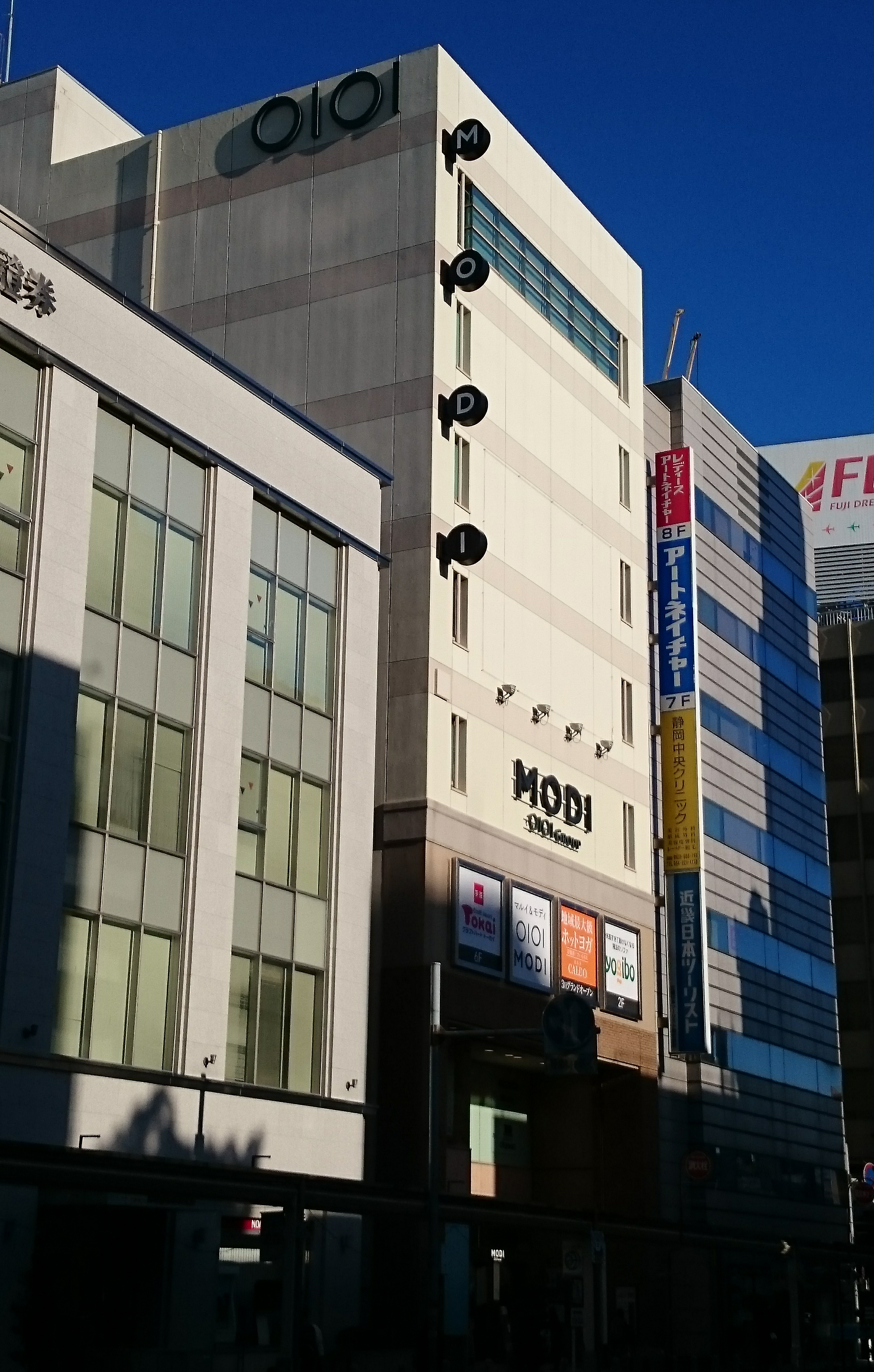 静岡モディ（旧丸井静岡店B館「けやきプラザ」）を御幸町通り側より2017年1月30日に通りすがり2号が撮影。